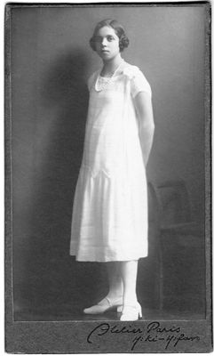 Tyyne Savian Atelier Parisissa osoitteessa Mikonkatu 19, Helsinki ottama valokuva